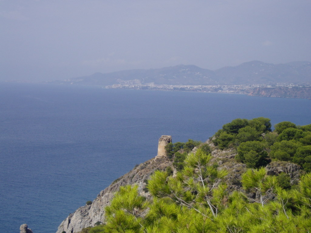 Acantilados de Maro-Cerro Gordo